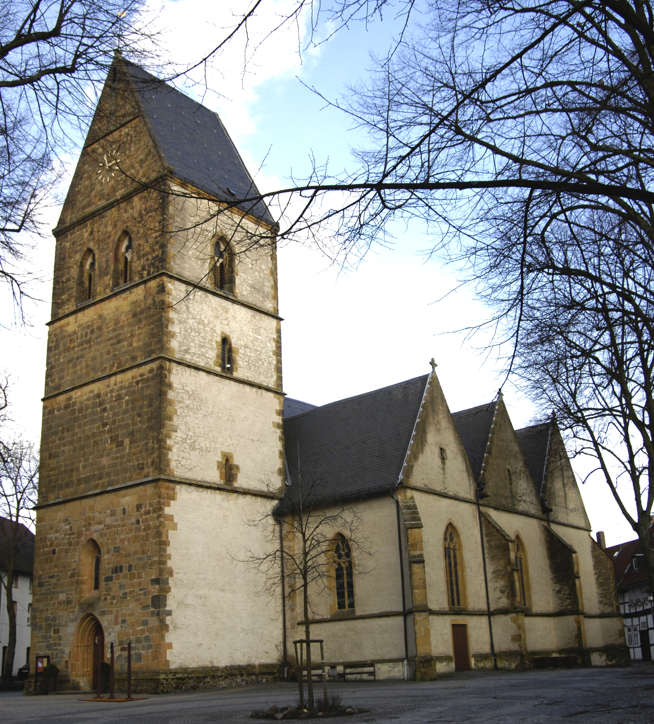 Halle/Westf., evang. St. Johanniskirche